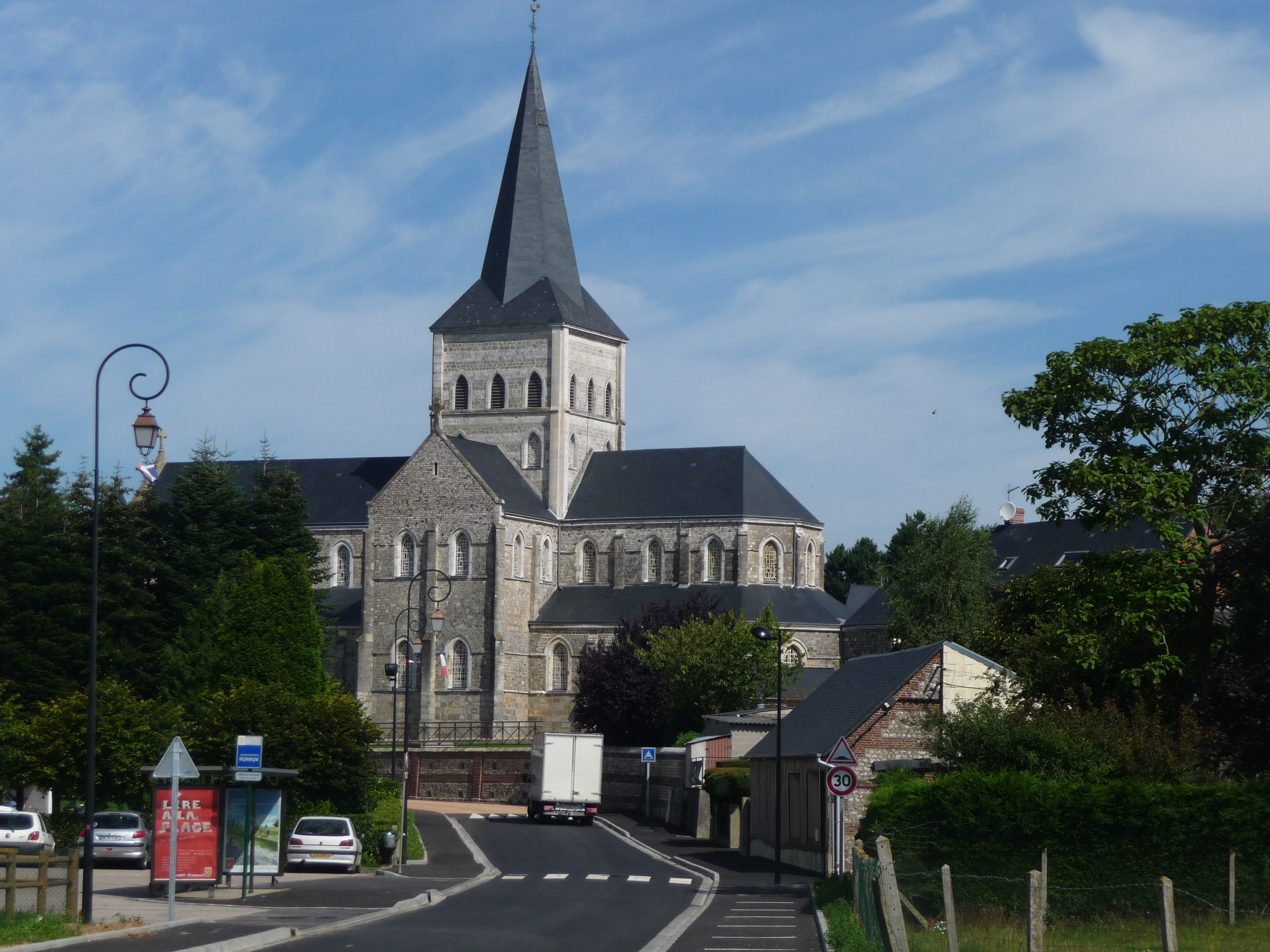 Eglise du 20ème siècle